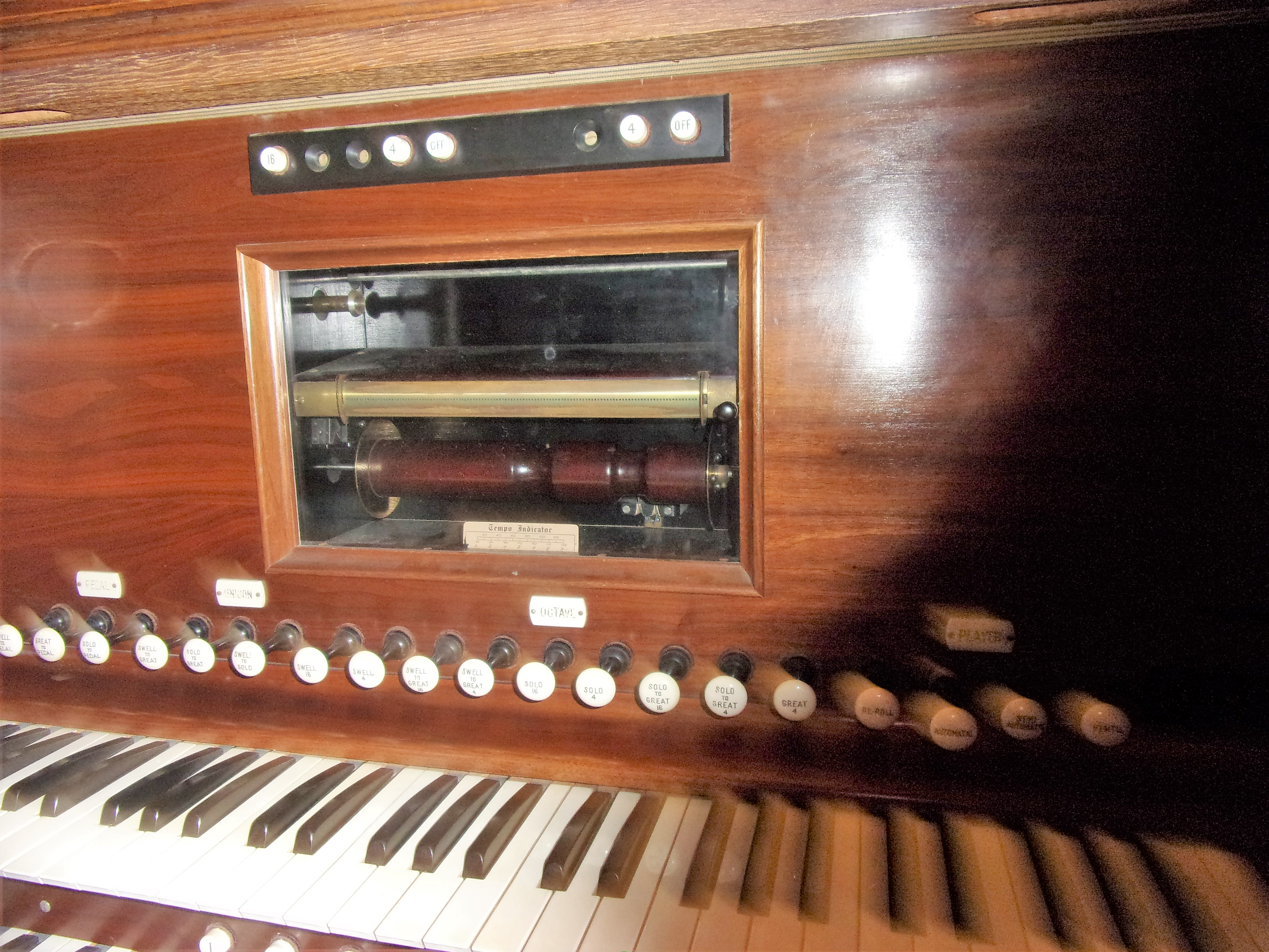 ¨Lecteur de rouleaux de l'orgue de Cané